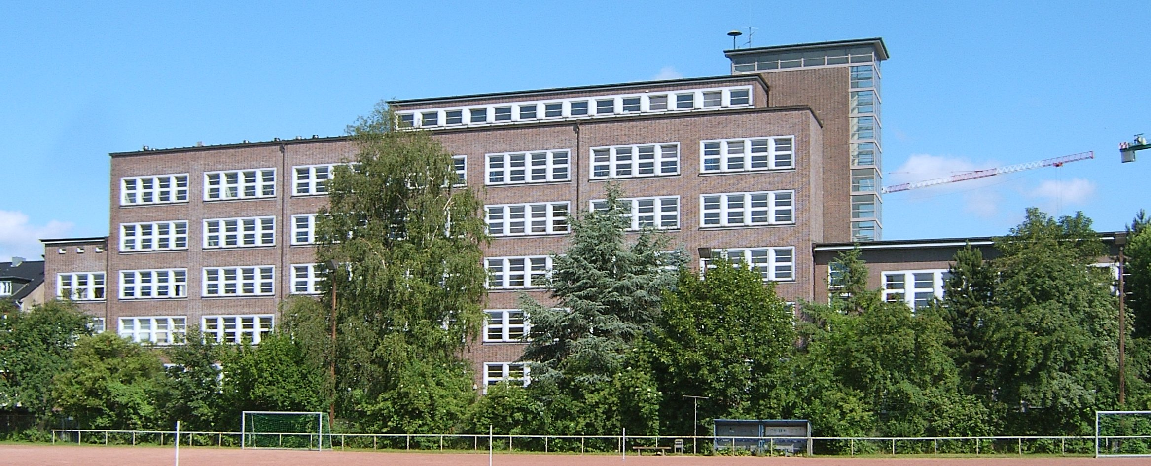 Hamburg, Hammerbrook, Schule Wendenstraße, Rückansicht